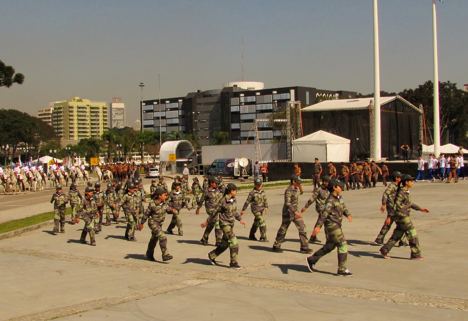 Desfile de integrantes do Projeto Guardiões da Natureza, em 10 de agosto de 2012.